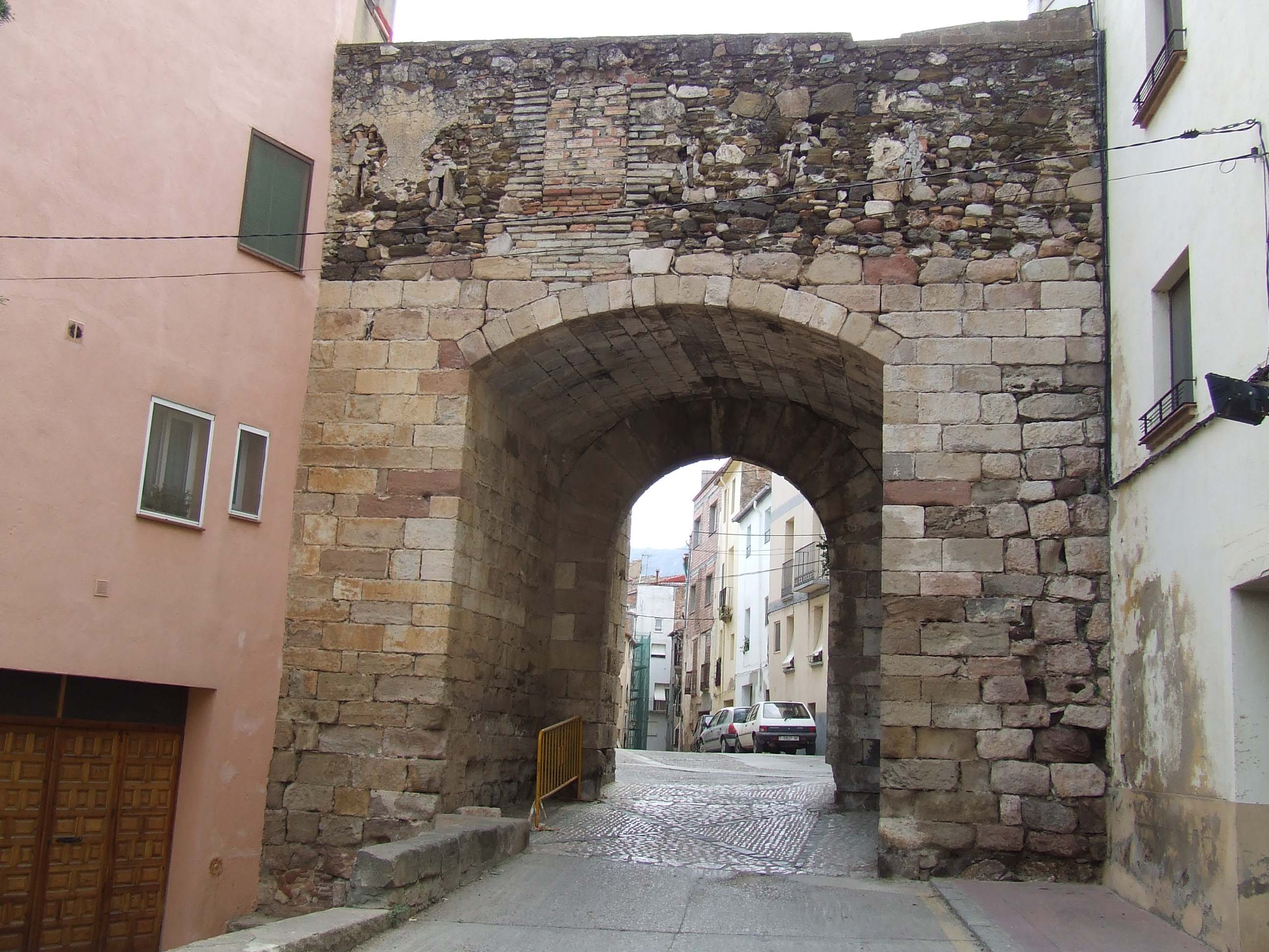 Portal del Bou. Únic portal que queda de la muralla medieval.